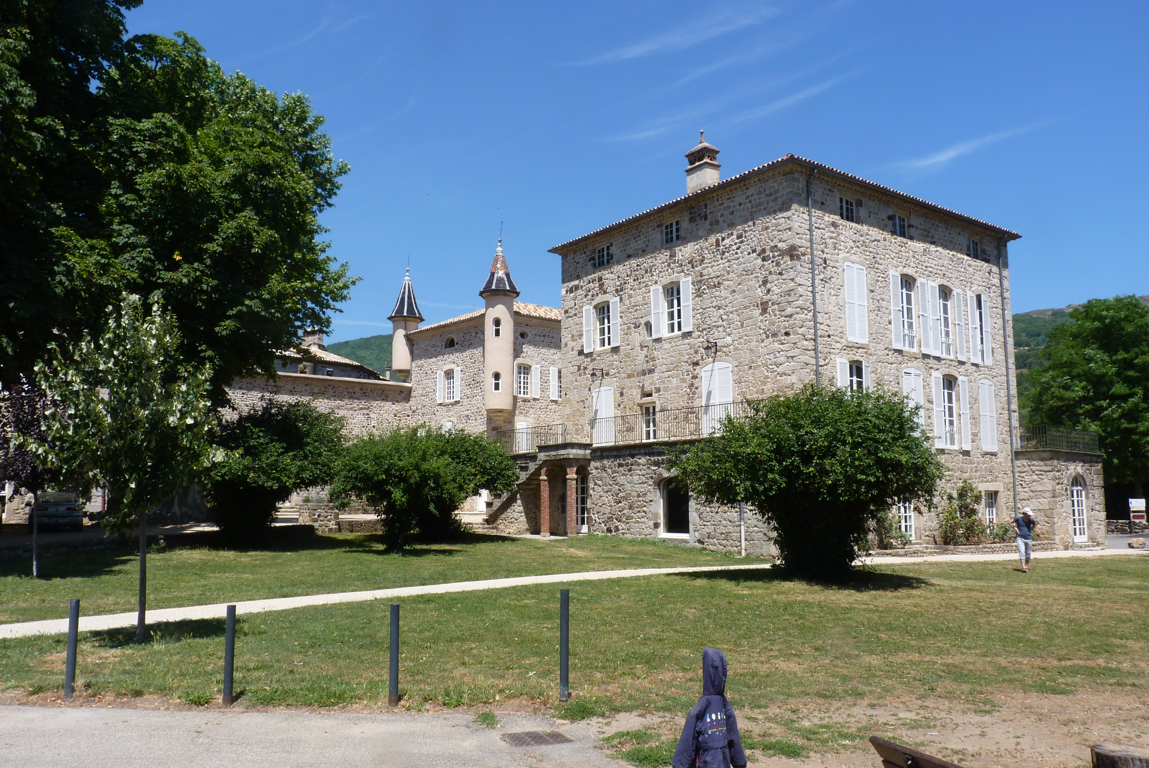 Thueyts dans le département de l'Ardèche : Château de Blou, XIVe au XIXe siècle.